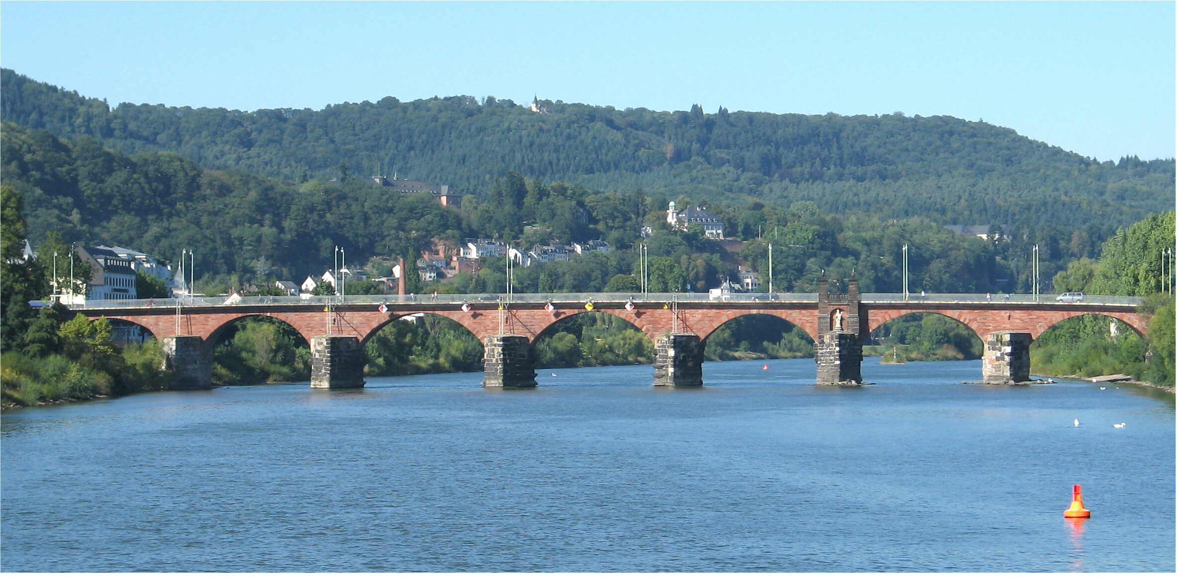 Sujet: D'Réimerbrëck zu Tréier Source: Eege Foto User:Johnny Chicago Lizenz:lb:GFDL